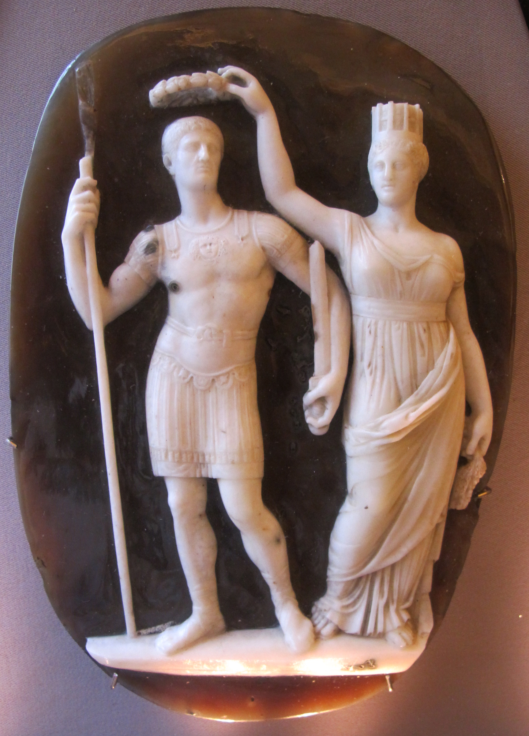 Glittica romana, costantino e la tyche di costantinopoli, sardonice IV sec